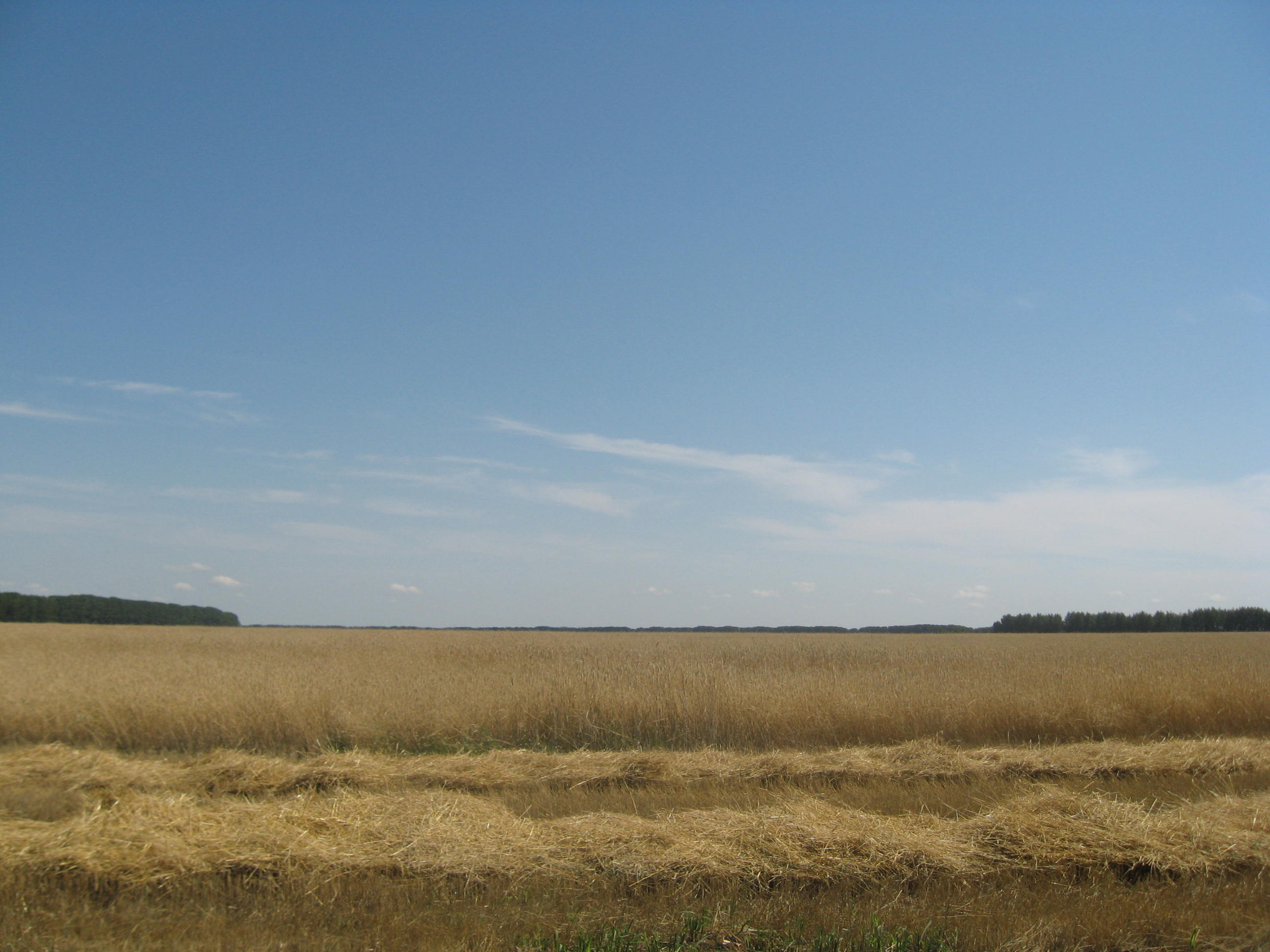 Поля хозяйства села Моховое. Видны зерновые.